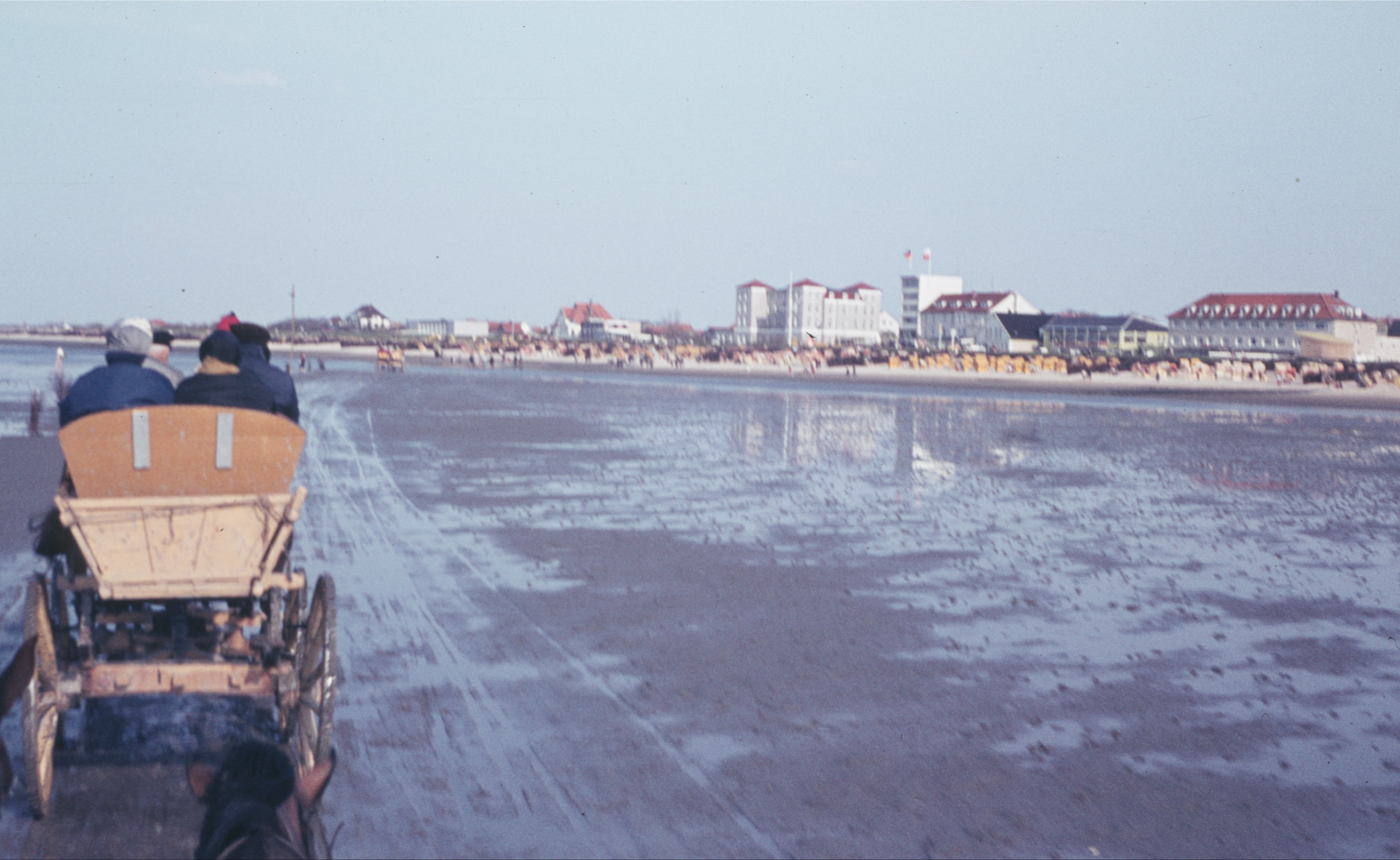 Wattwagen vor Duhnen. Rückfahrt von Neuwerk.